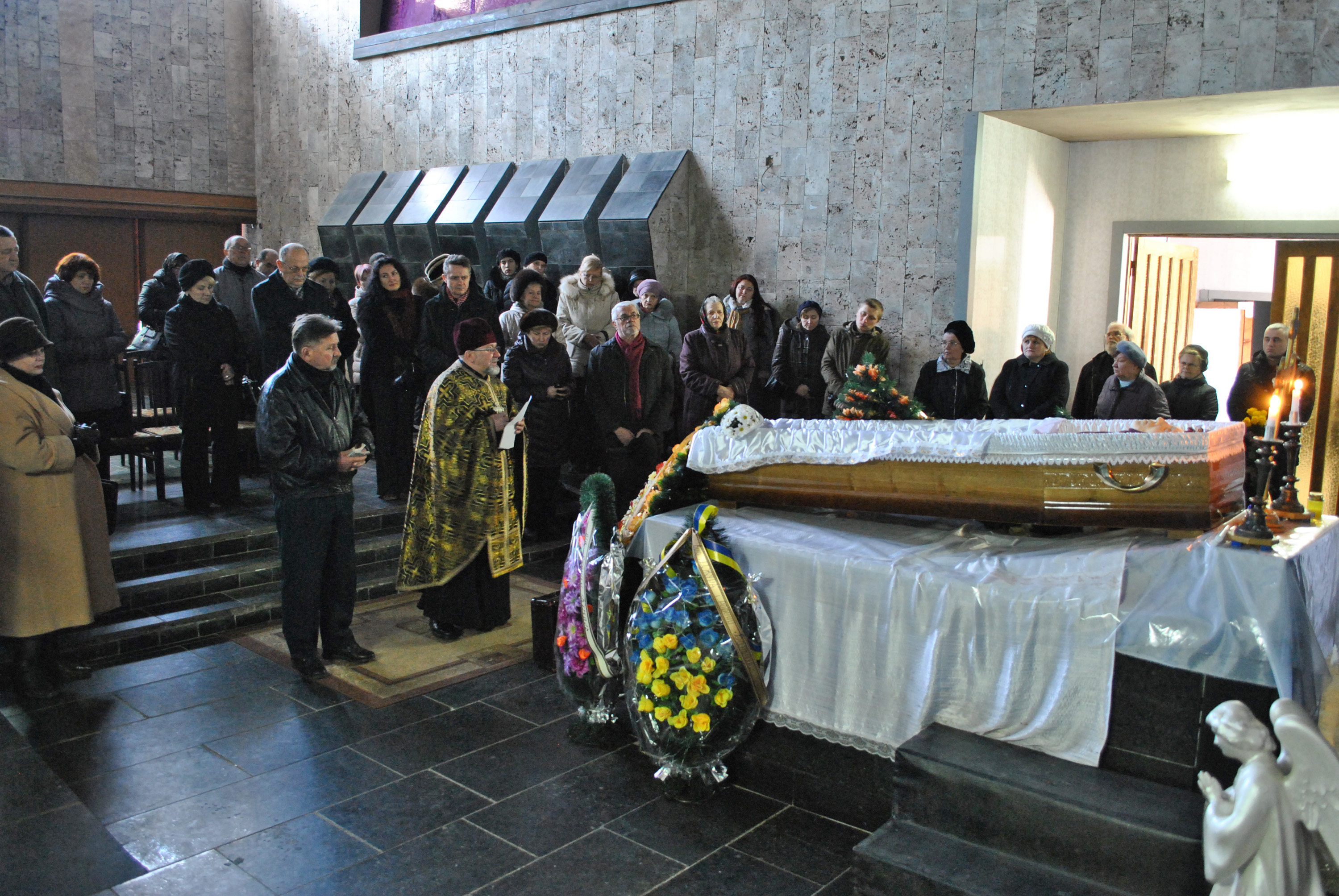 Похорон українського архівіста, краєзнавця, членкині ВУСК, уродженки м. Тернополя, авторки книги «Терно­піль у плині літ» Любомири Степанівни Бойцун. Панахида в Домі печалі (м. Тернопіль, 6 березня 2015 року).